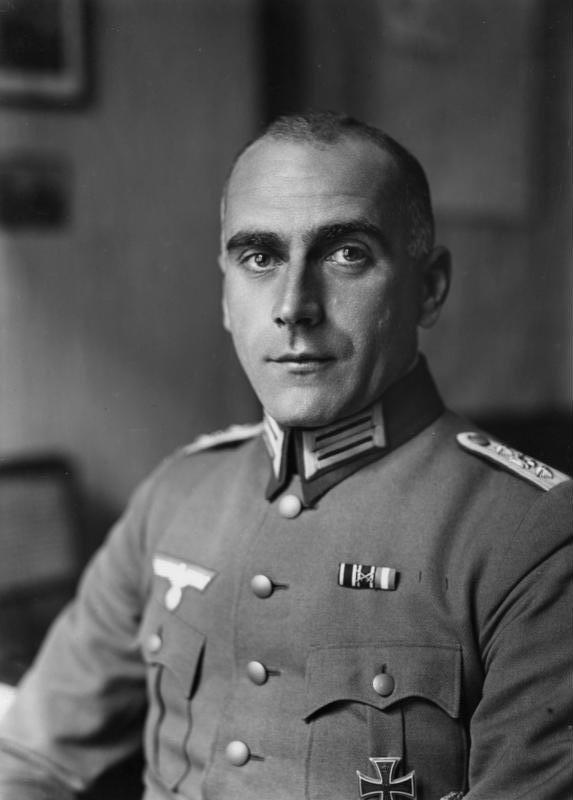 Wolfgang Fürstner Hauptmann Wolfgang Fürstner Kommandant des olympischen Dorfes 33219-35 Abgebildete Personen: Fürstner, Wolfgang: Hauptmann, Kommandant des Olympischen Dorfes 1936, Deutschland